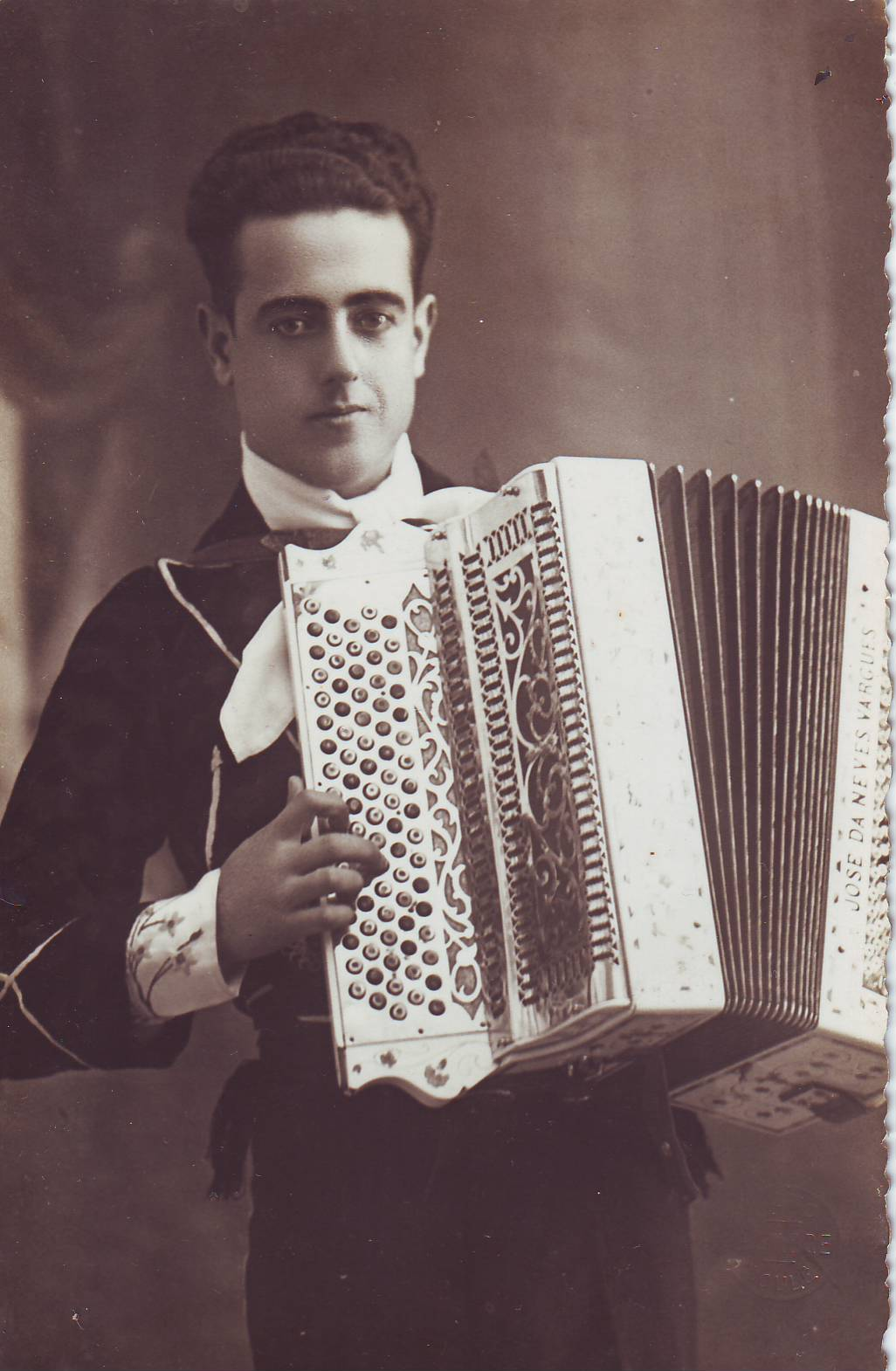 ImagemJosé Ferreiro Júnior em jovem